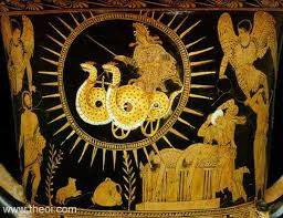 Η Μήδεια διαφεύγει στην Αθήνα με το άρμα που σέρνουν δύο φτερωτοί δράκοντες, ενώ κάτω δεξιά απεικονίζεται ο Ιάσωνας, ο οποίος θρηνεί πάνω από τα σώματα των παιδιών του. Πάνω του βρίσκεται η προσωποποίηση της Ποινής με φτερά στην πλάτη. Ερυθρόμορφος Κρατήρας του 4ου π.Χ. αιώνα.